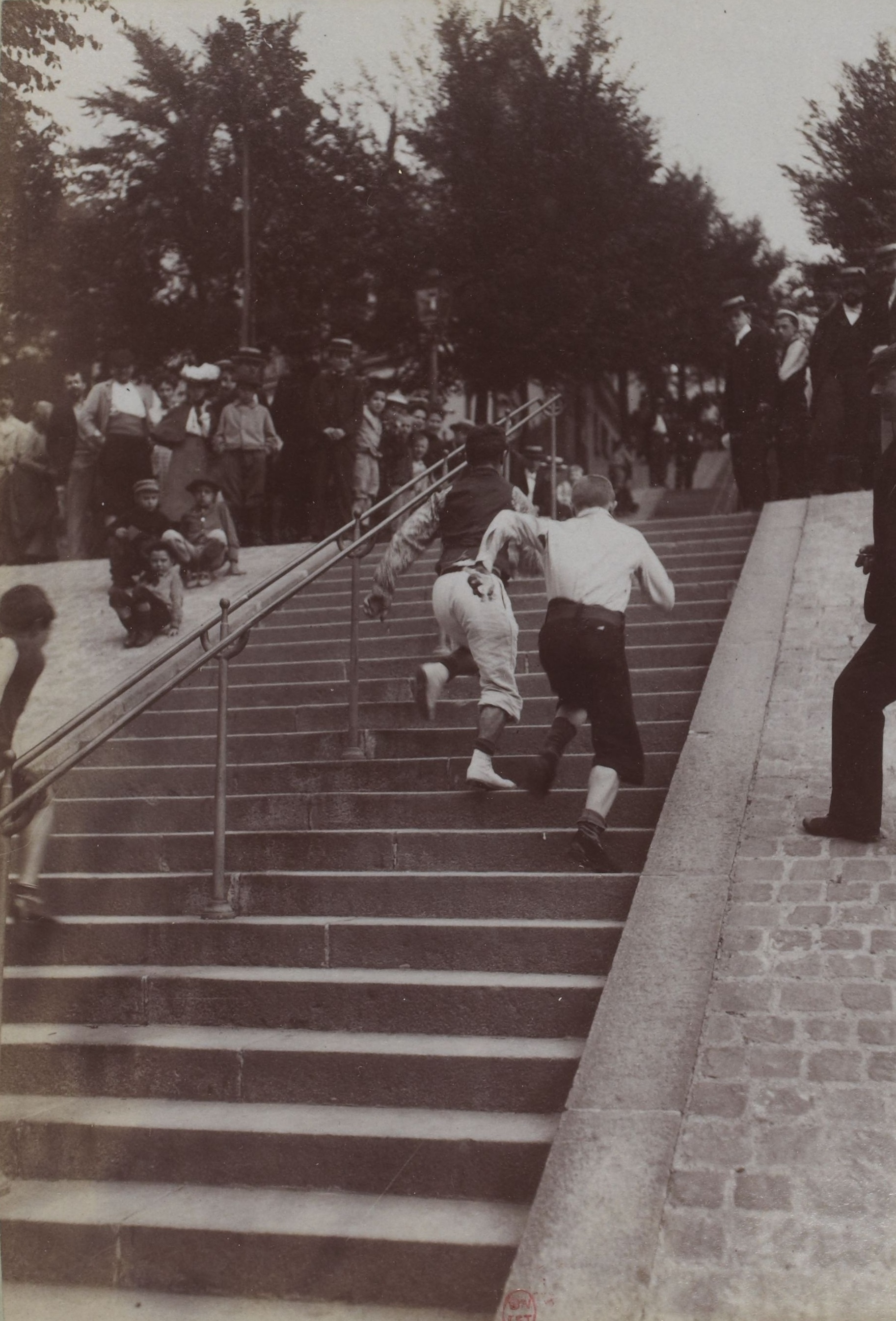 [Collection Jules Beau. Photographie sportive] : T. 22. Année 1903 / Jules Beau : F. 23v. Championnat de l' Escalier, 14 juillet 1903